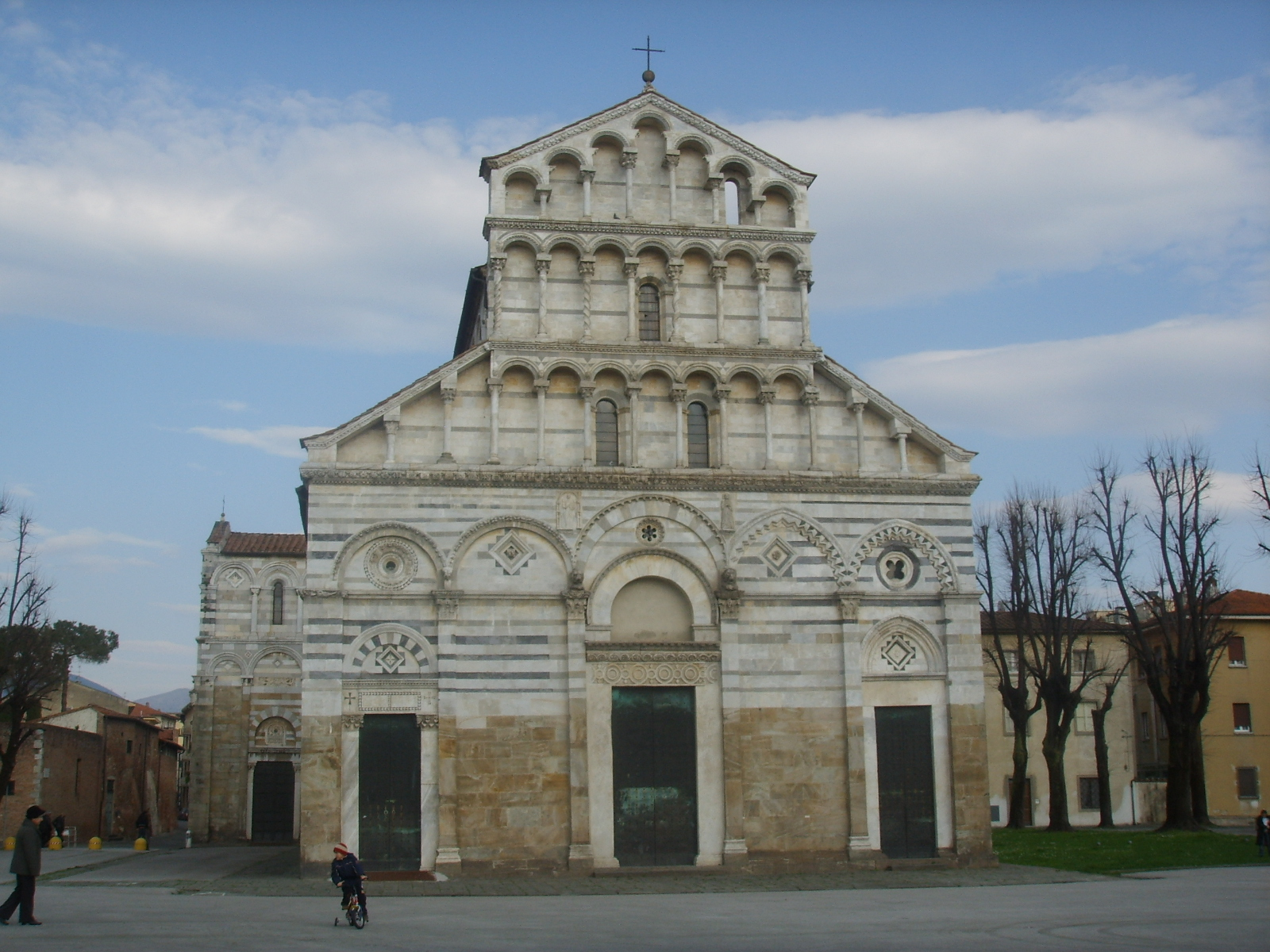 La chiesa di San Paolo a Ripa d'Arno a Pisa.